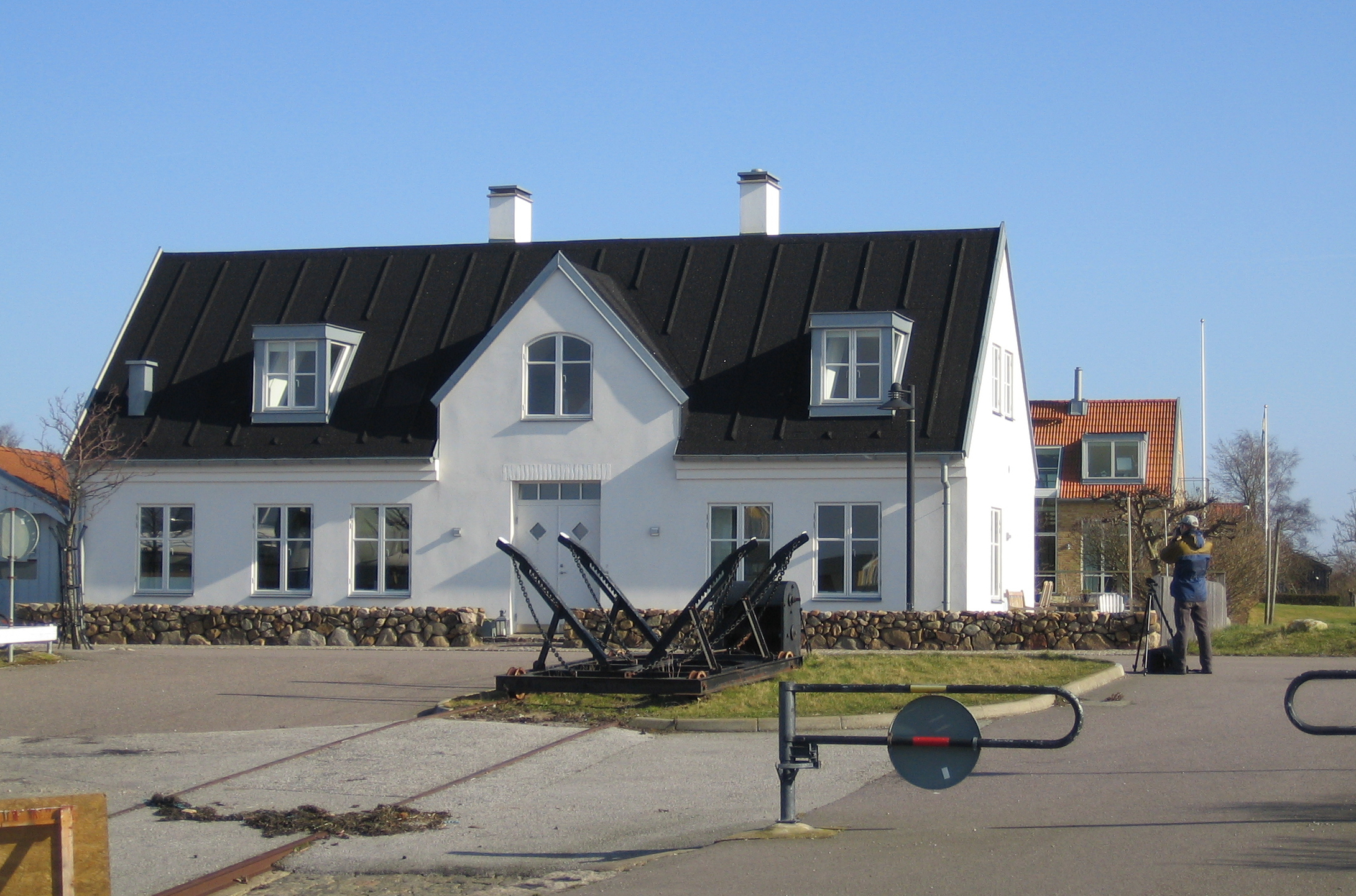 Barsebäckshamn in Skåne, Sweden